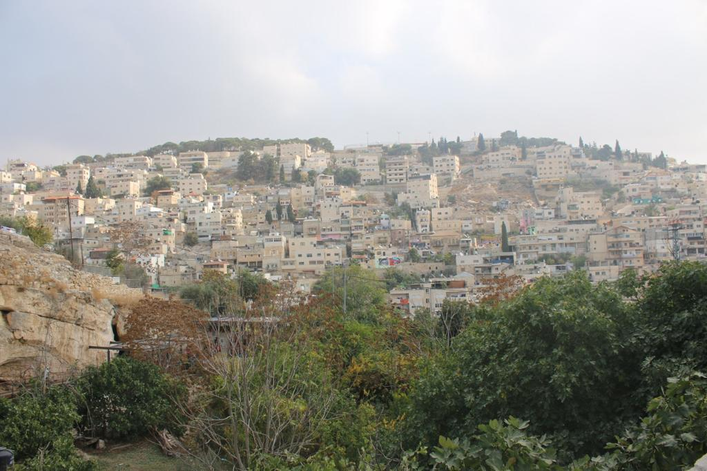 واجهة سلوان